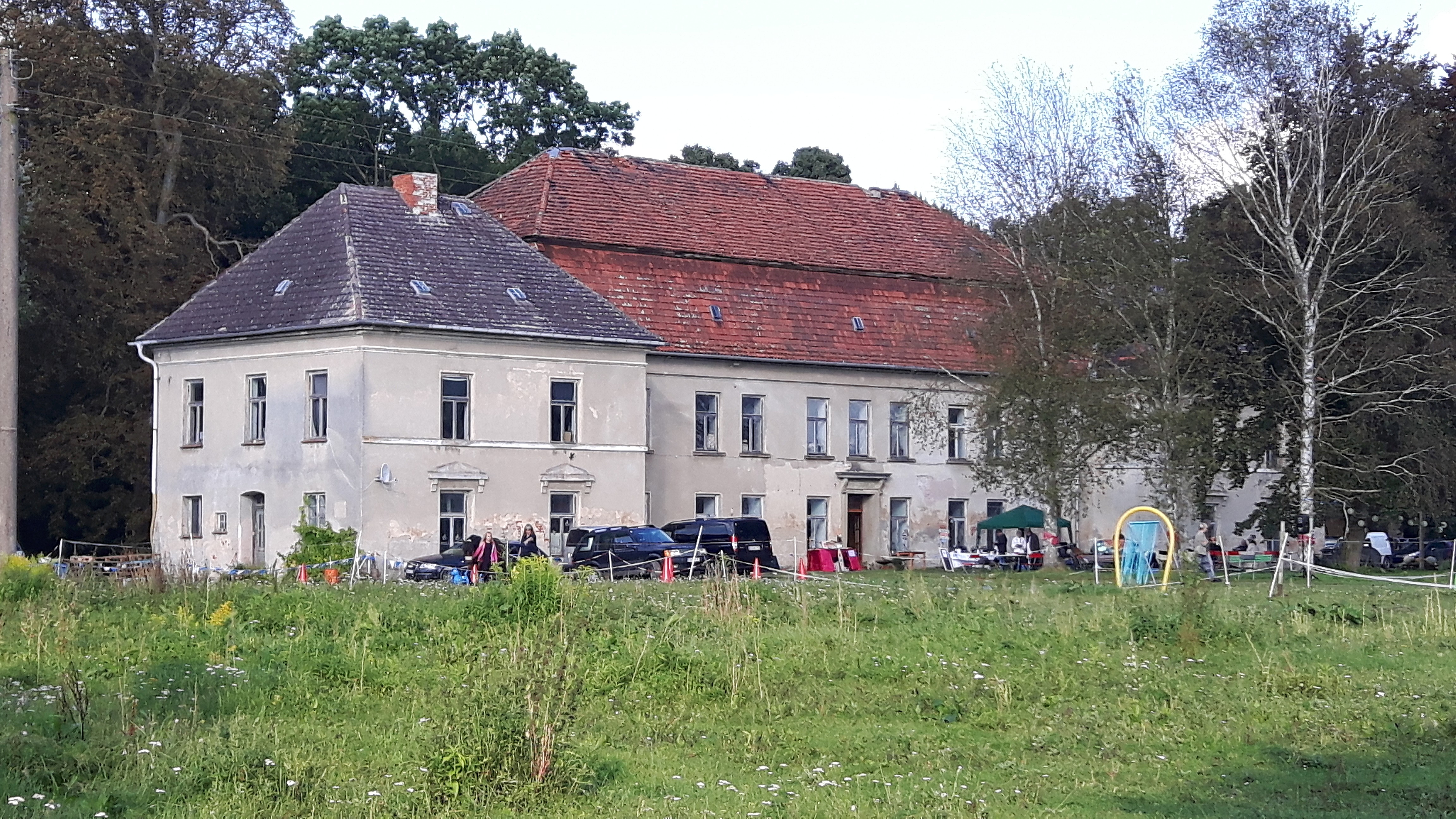 Ehemaliges Gutshaus Neuhof in Neuhof, Landkreis Nordwestmecklenburg, Amt Neukloster-Warin